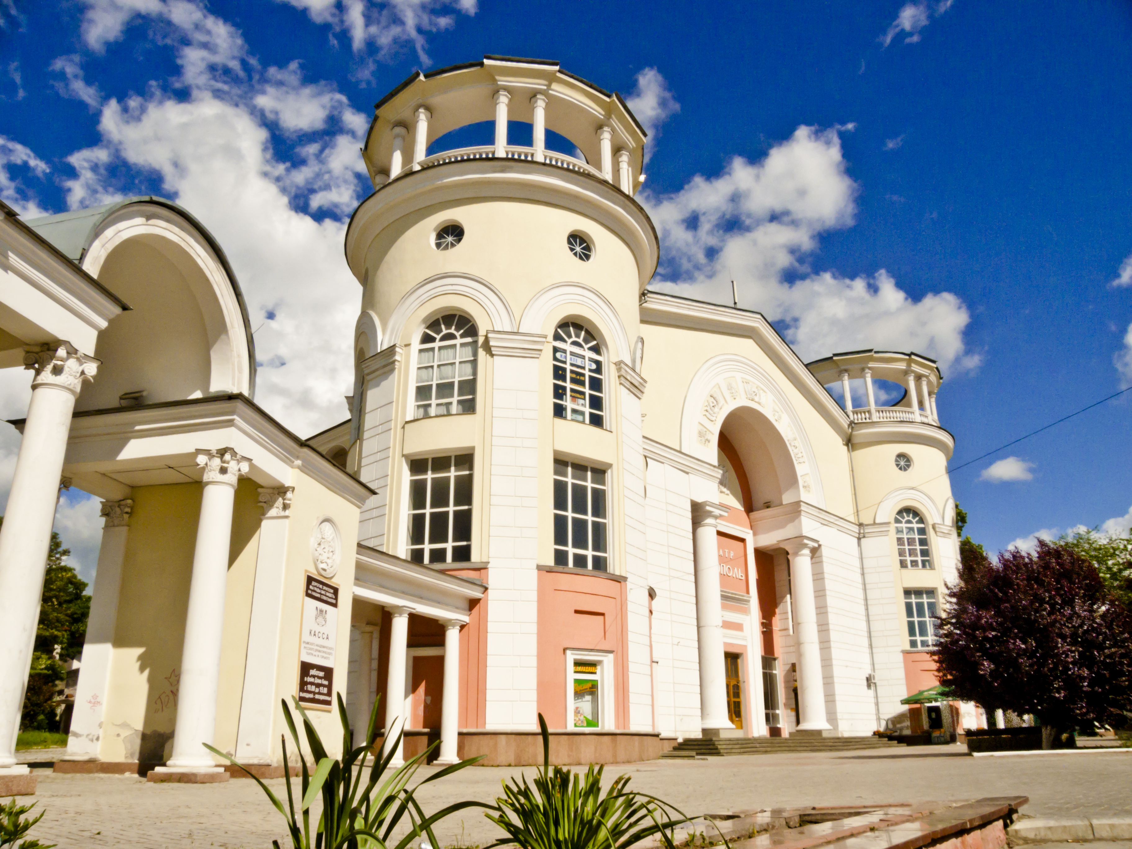 Будівля кінотеатру «Сімферополь», Сімферополь, пр. Кірова, 37, літер «А-3», «Б-1», «Б-2», «а-1», «а-2», «а-3», «а-4», «а-5», «а-6», «а-7», «а-8», «а-9», «а-10»